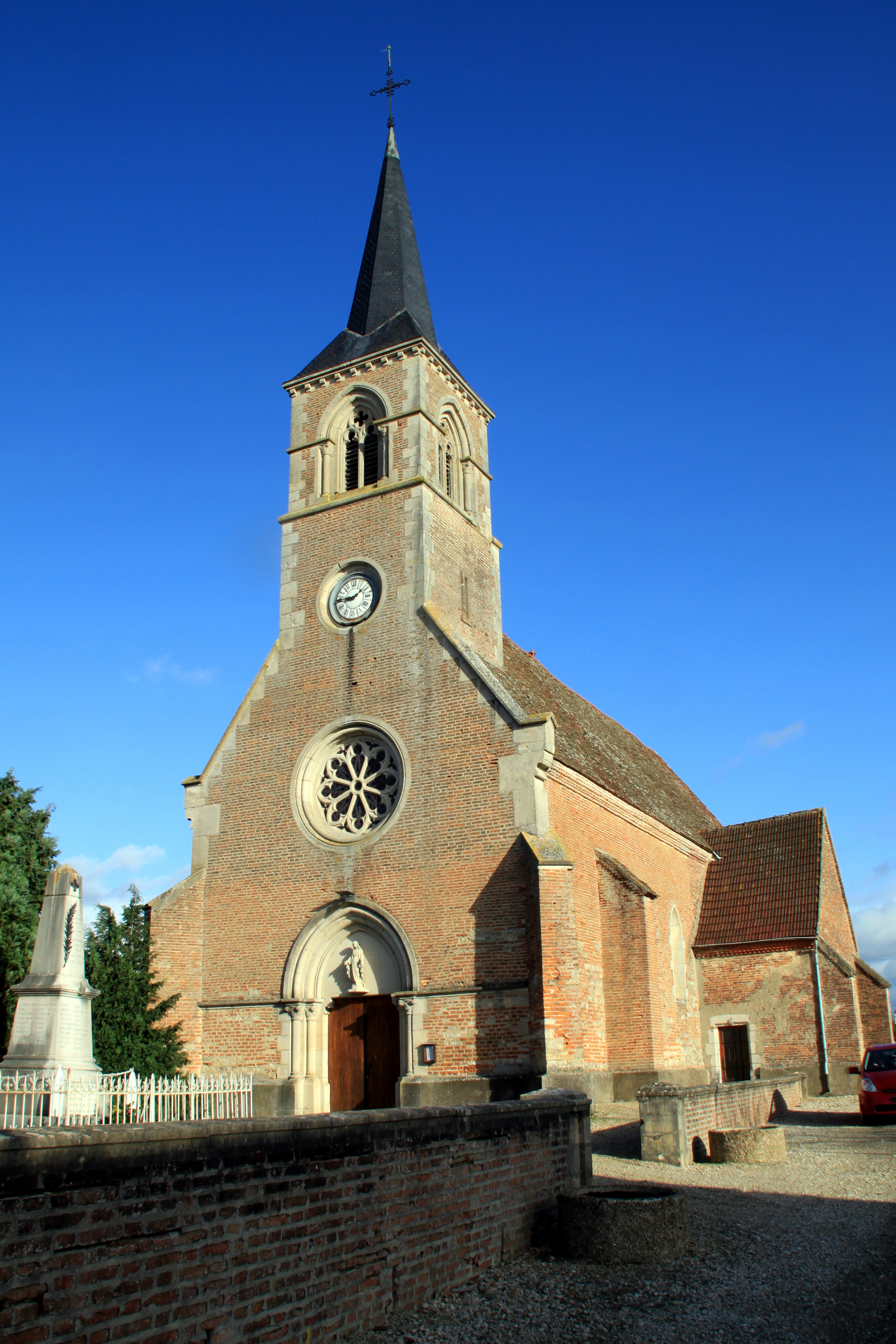 Frontenard Kirche